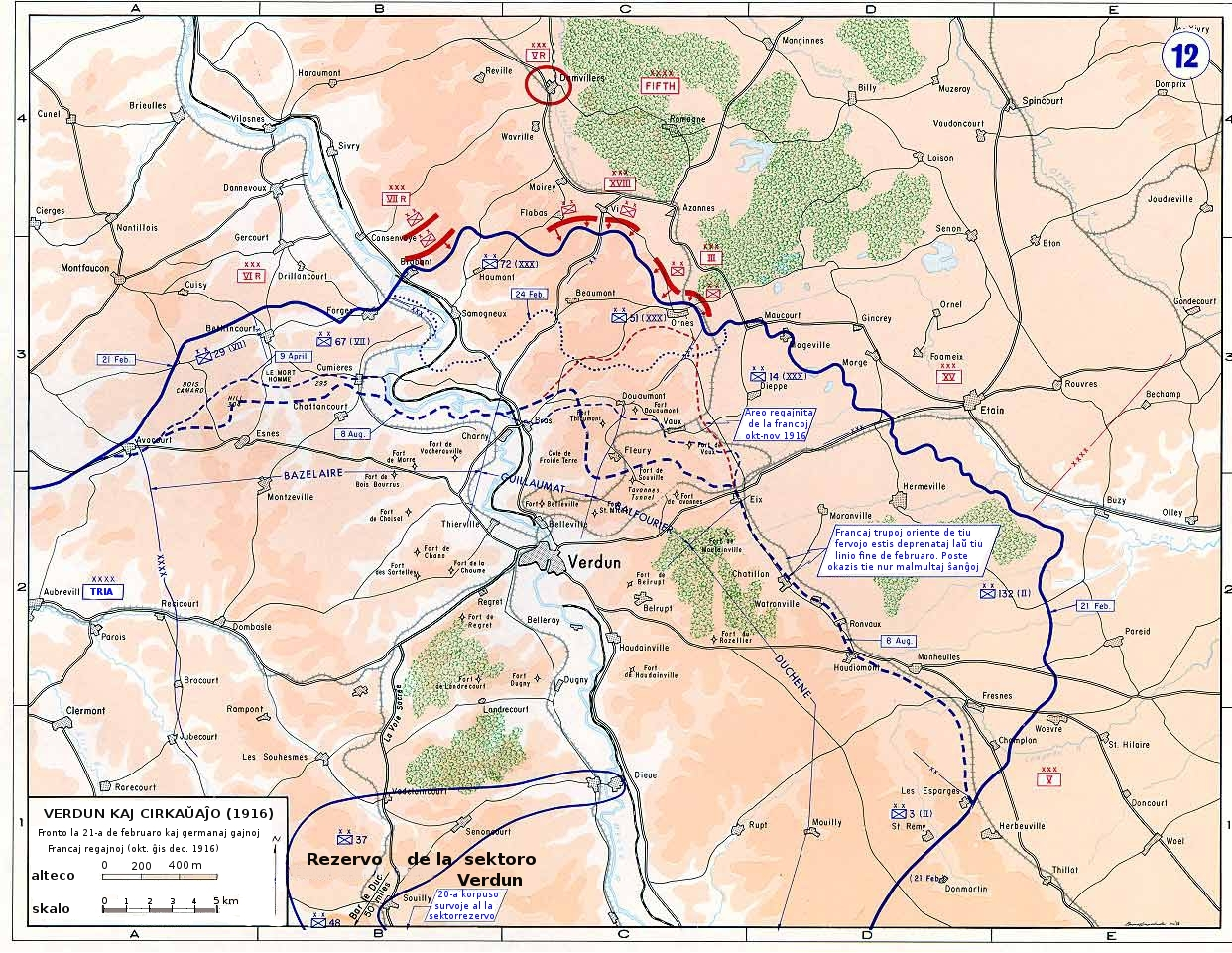 La fronto dum la batalo apud Verdun (1916)